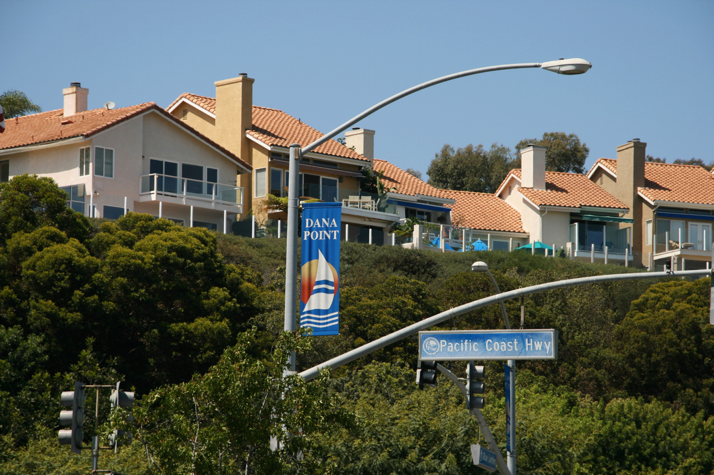 Häuser an der California State Route 1 (Pacific Coast Highway) in Dana Point, Kalifornien.